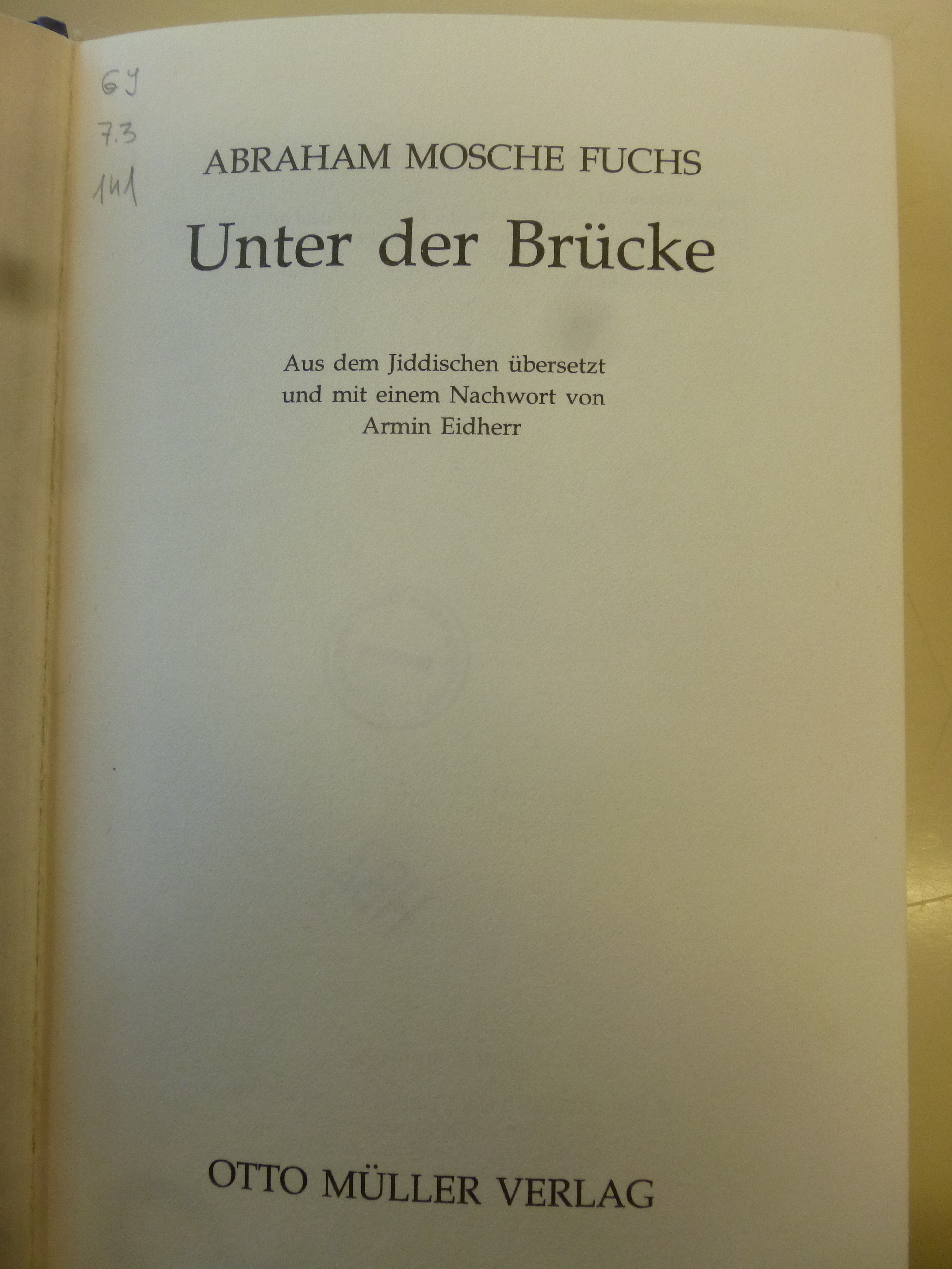 Abraham Mosche Fuchs Unter der Brücke 1997 Titelseite